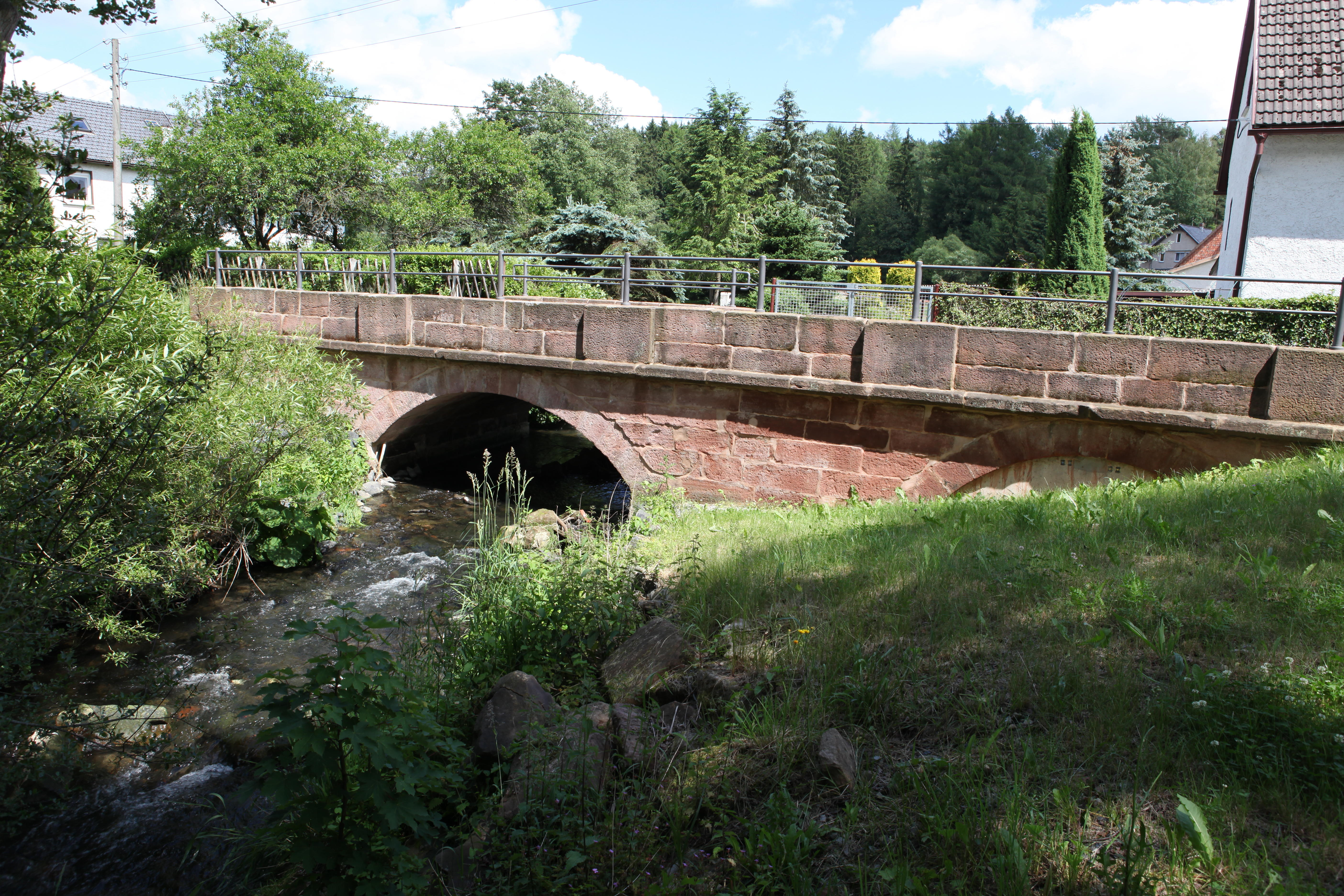 Effelderbrücke in Döhlau, OT von Frankenblick, Thüringen